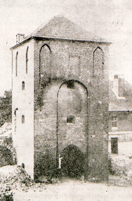 Nowomiejska brama św. Katarzyny w Toruniu, zburzona w 1884